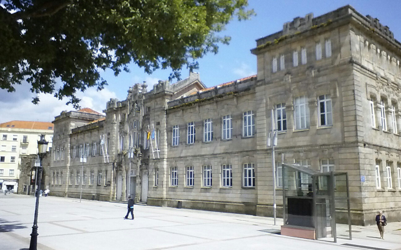 Instituto Valle-Inclán, exponente del modernismo en Pontevedra capital